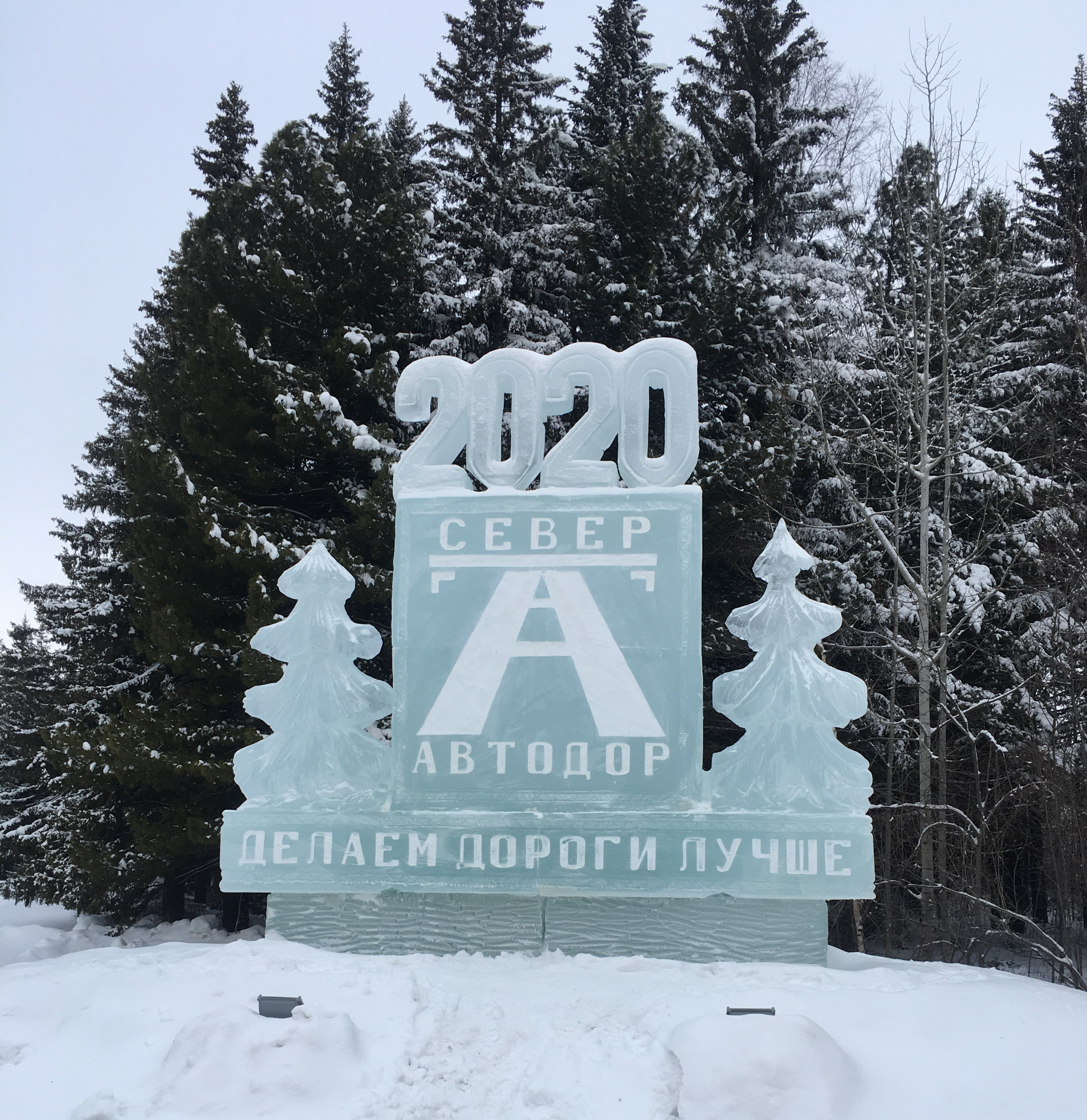 Скульптура Ханты-Мансийск